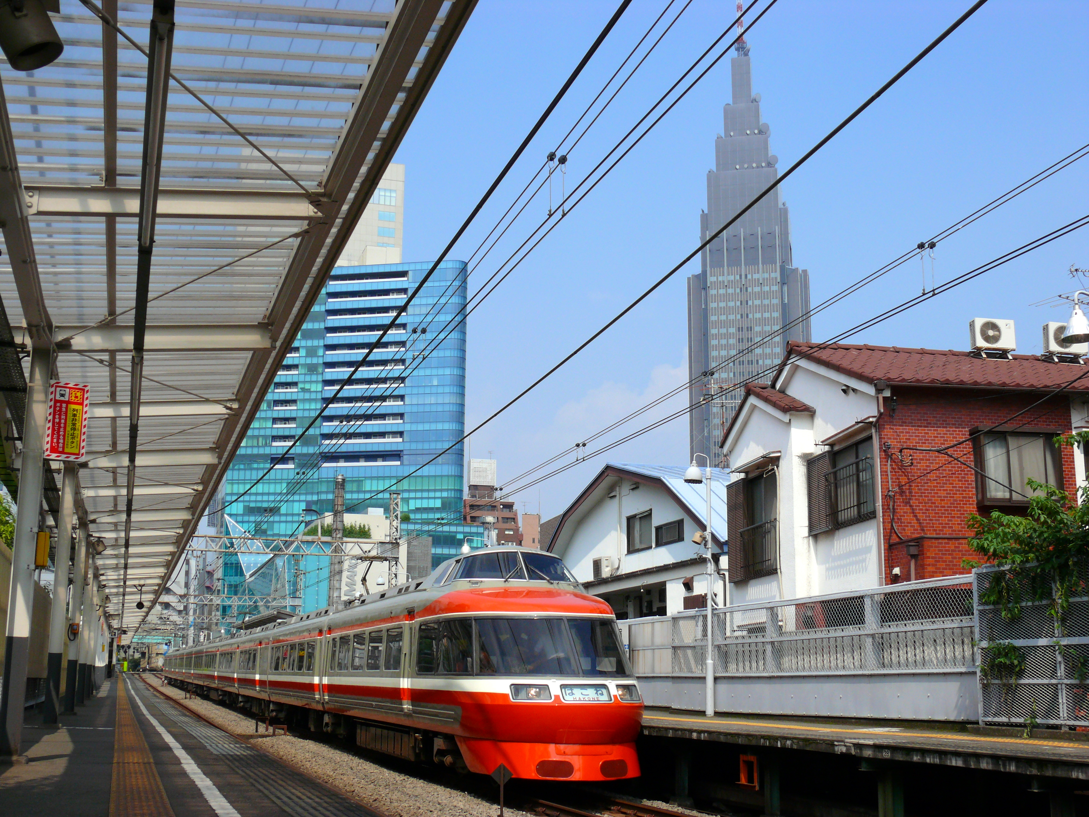 南新宿駅を通過する特急列車。